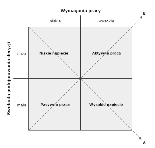 Schemat ilustrujący ideę modelu JD-C (modelu wymagań pracy-kotroli pracy)